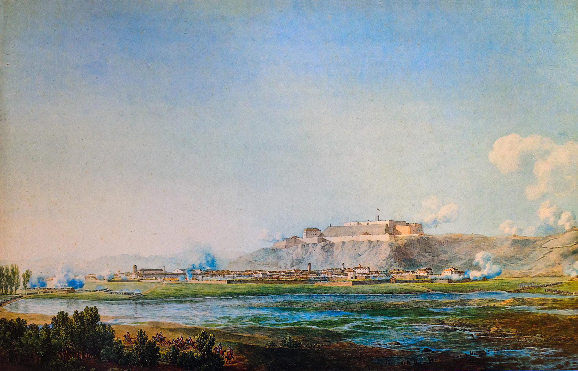 Rappresentazione dell'assedio delle truppe napoleoniche opera di G.P. Bagetti. 1796